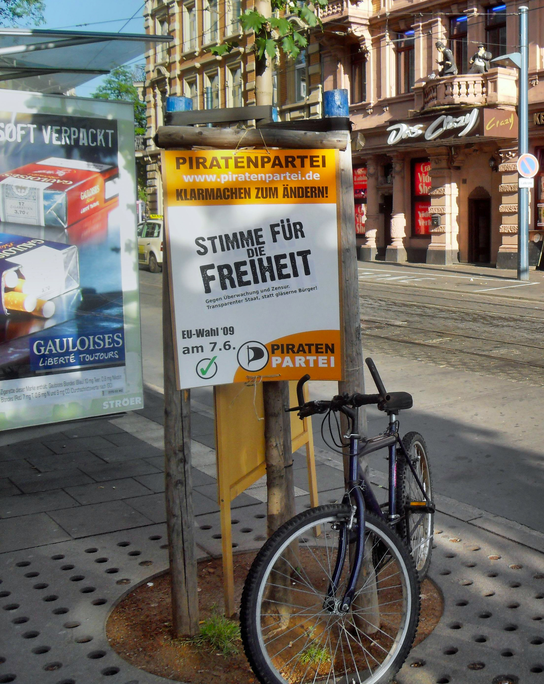 Wahlplakat der Piratenpartei Deutschland (Gründungsdatum: 10. September 2006) zur Europawahl 2009 (4. bis 7. Juni 2009) in Mainz-Altstadt in Rheinland-Pfalz